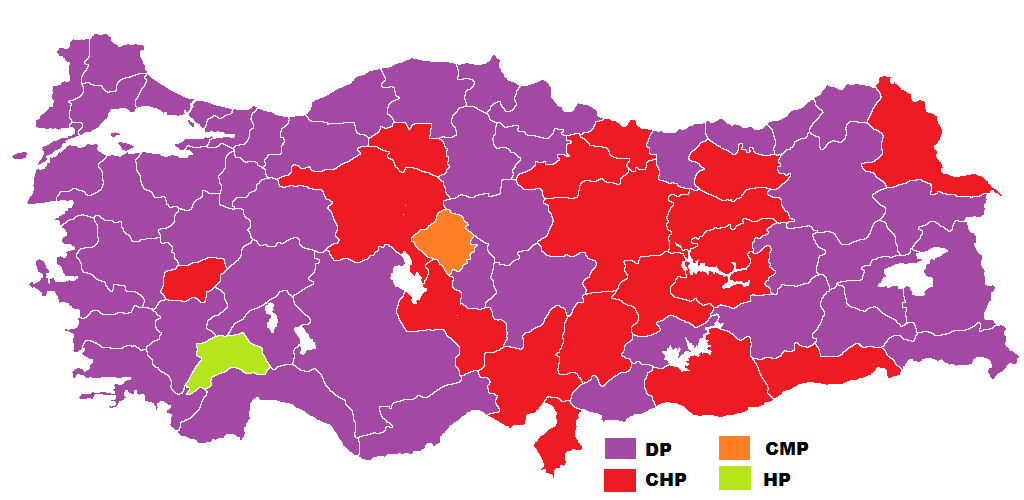 1957 genel seçimleri sonuçlarının Türkiye haritasında gösterimi.